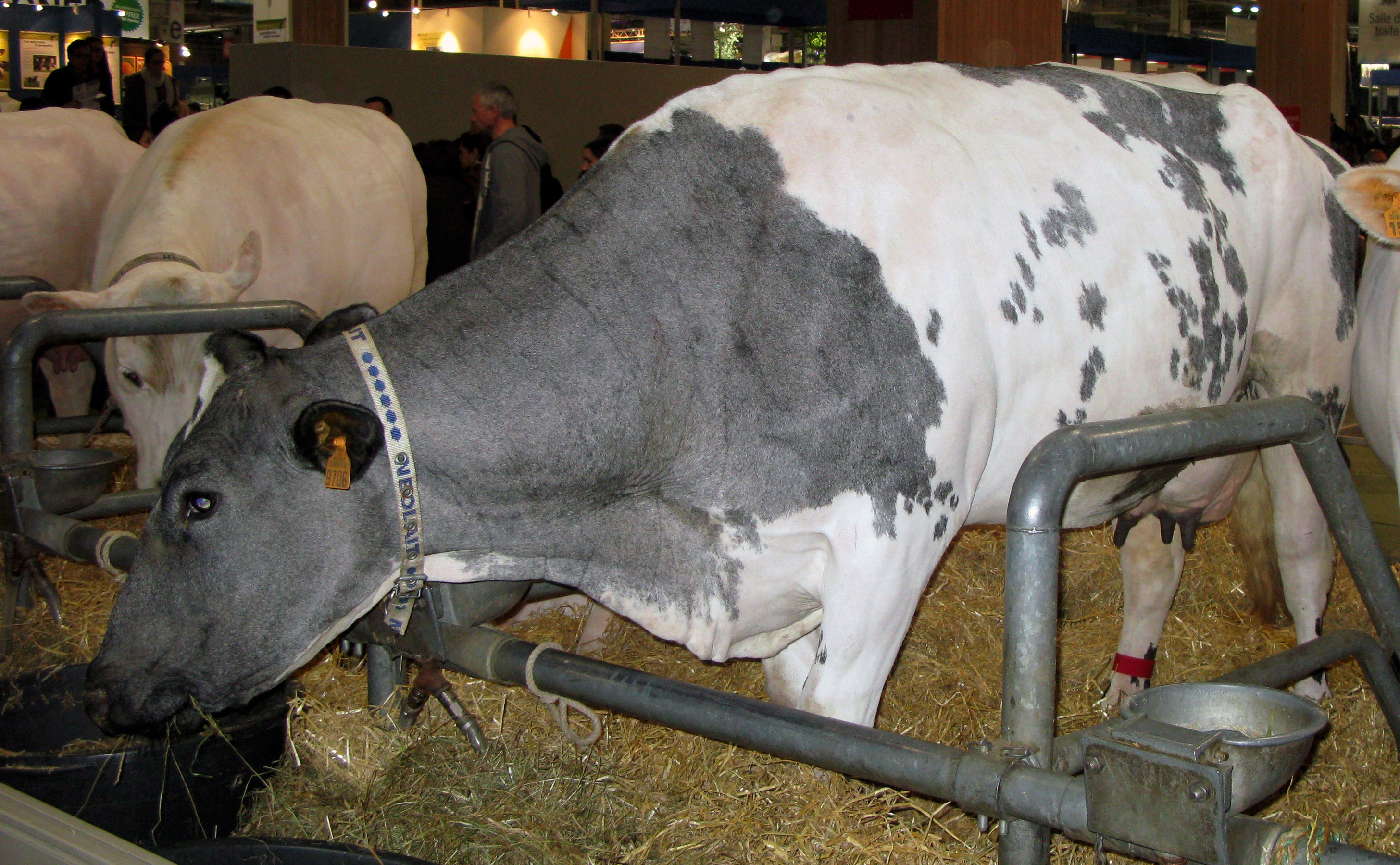 Vache de race Bleue du Nord, au salon de l'agriculture de Paris.